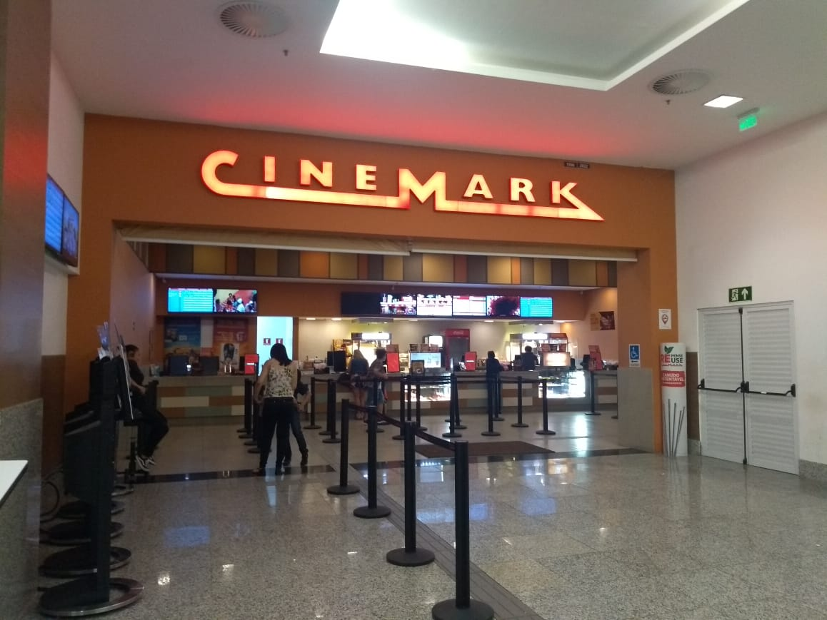 Imagens externas do Cinemark Boulevard Camaçari, localizado no shopping do mesmo nome da cidade de Camaçari, Bahia